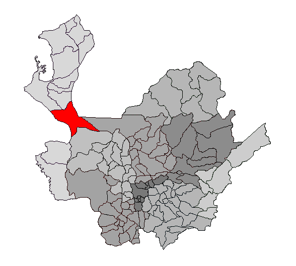 Ubicación del municipio de Mutatá en el departamento de Antioquia